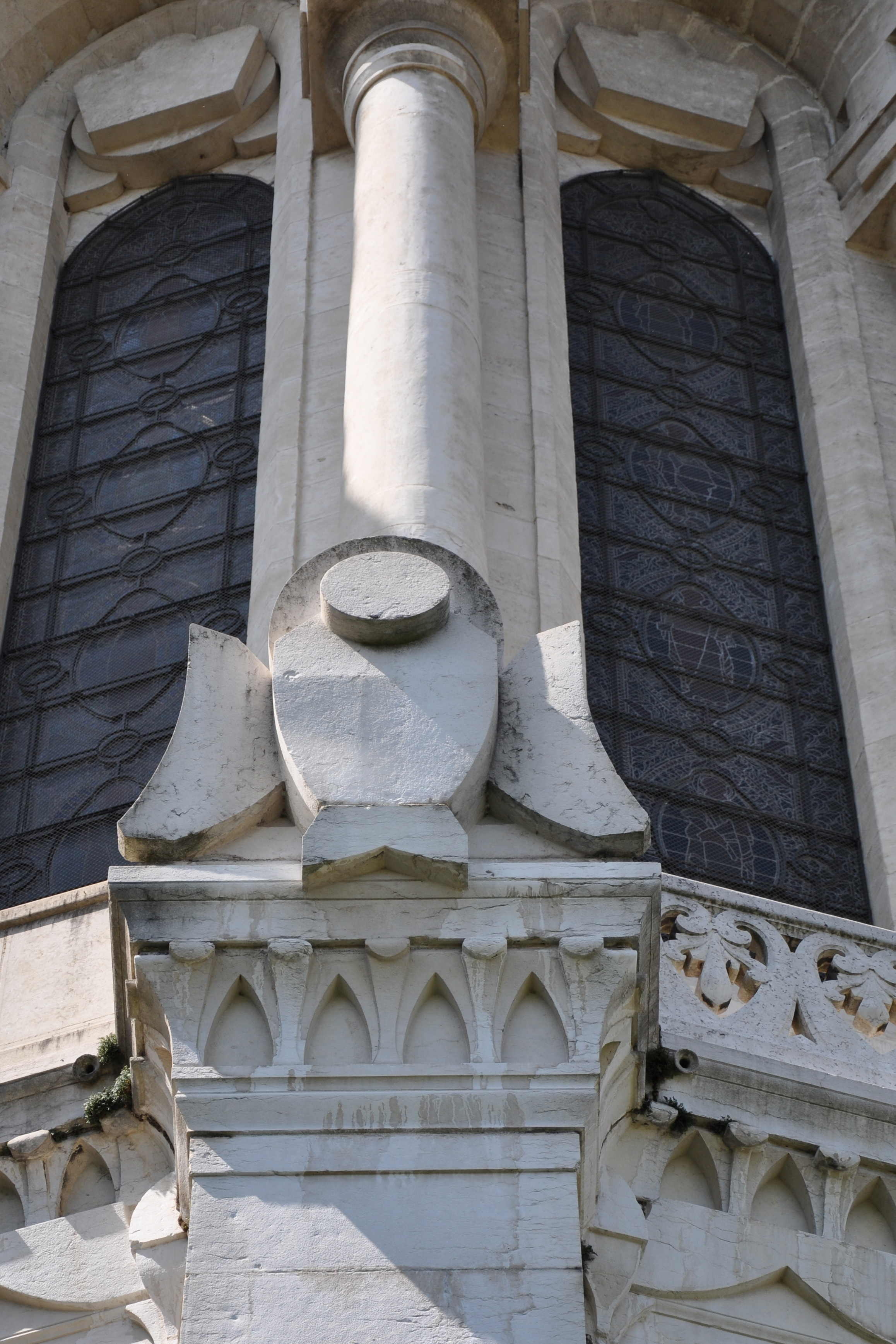 La basilique Notre-Dame de Fourvière à Lyon; décor de l'abside.